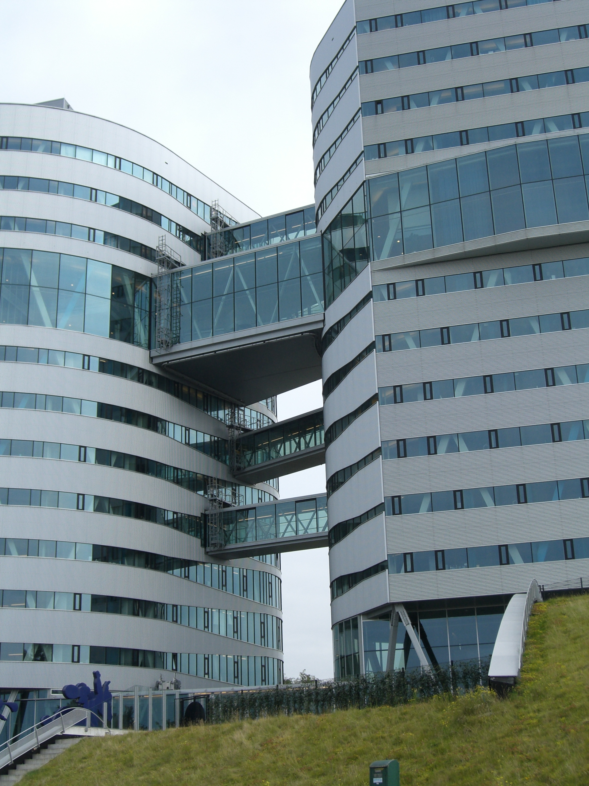 Waternet HQ, Amsterdam